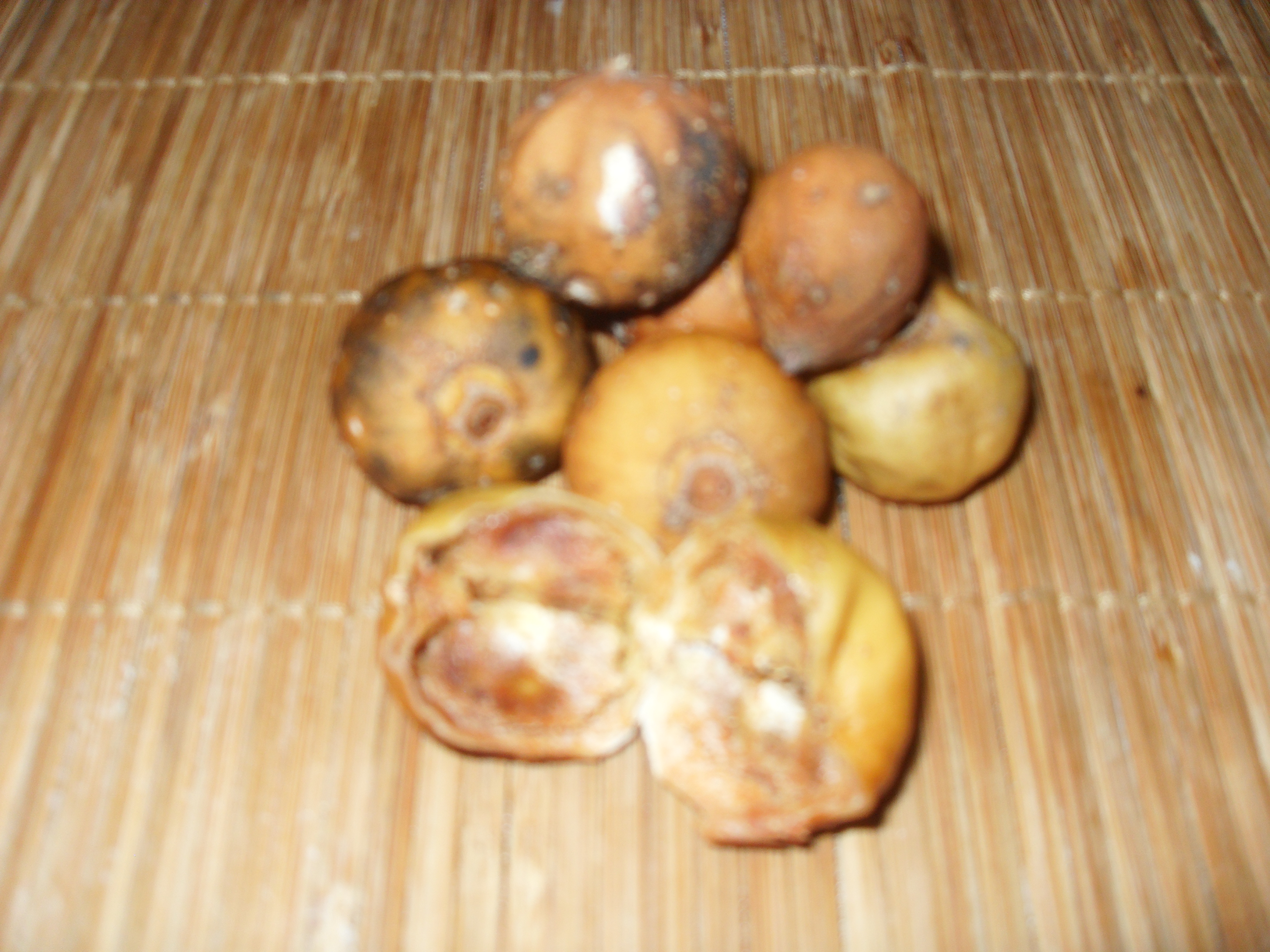 la couleur brûnatre de la vavangue